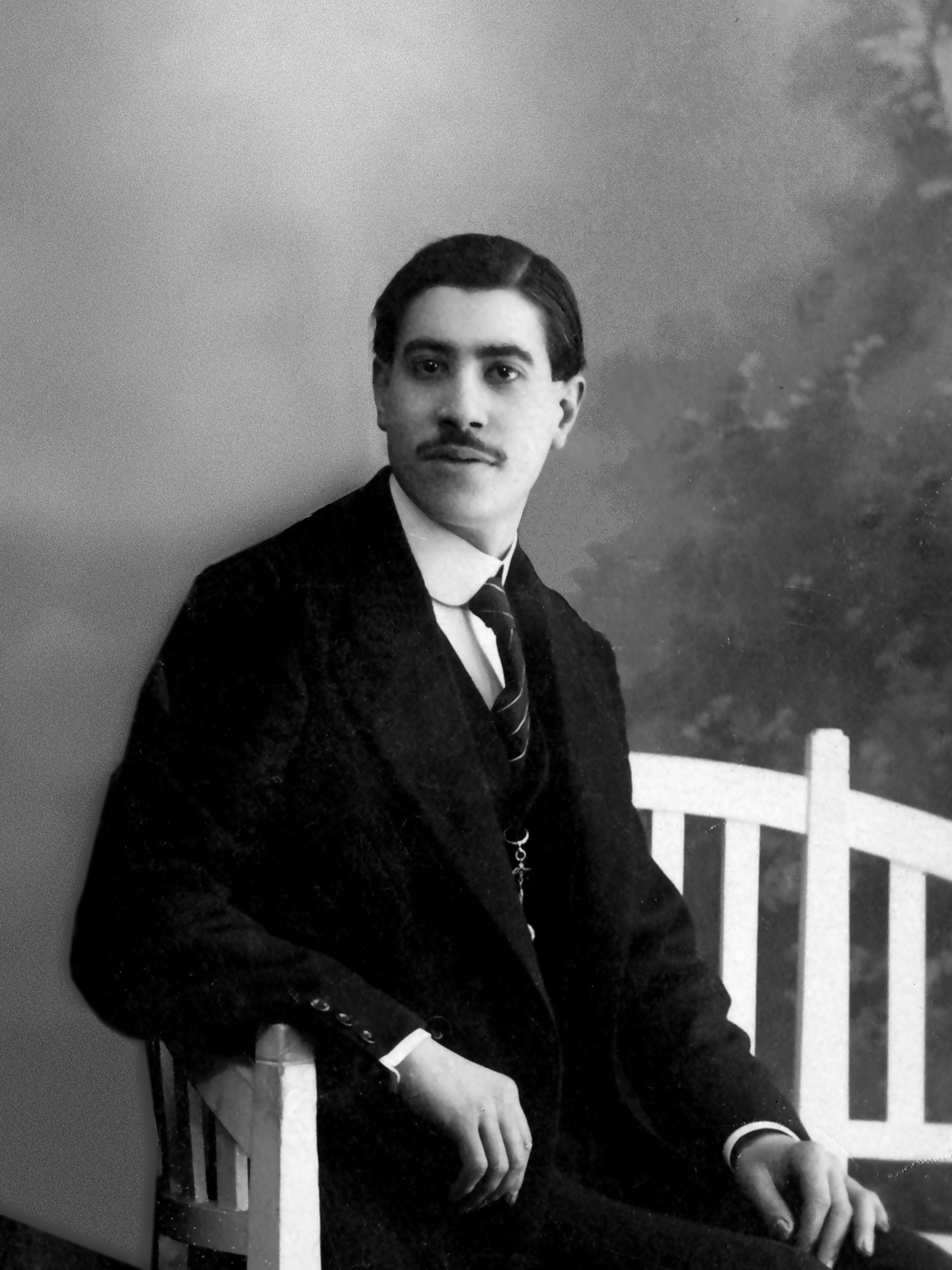 Modesto Borreguero, guitarrero madrileño.